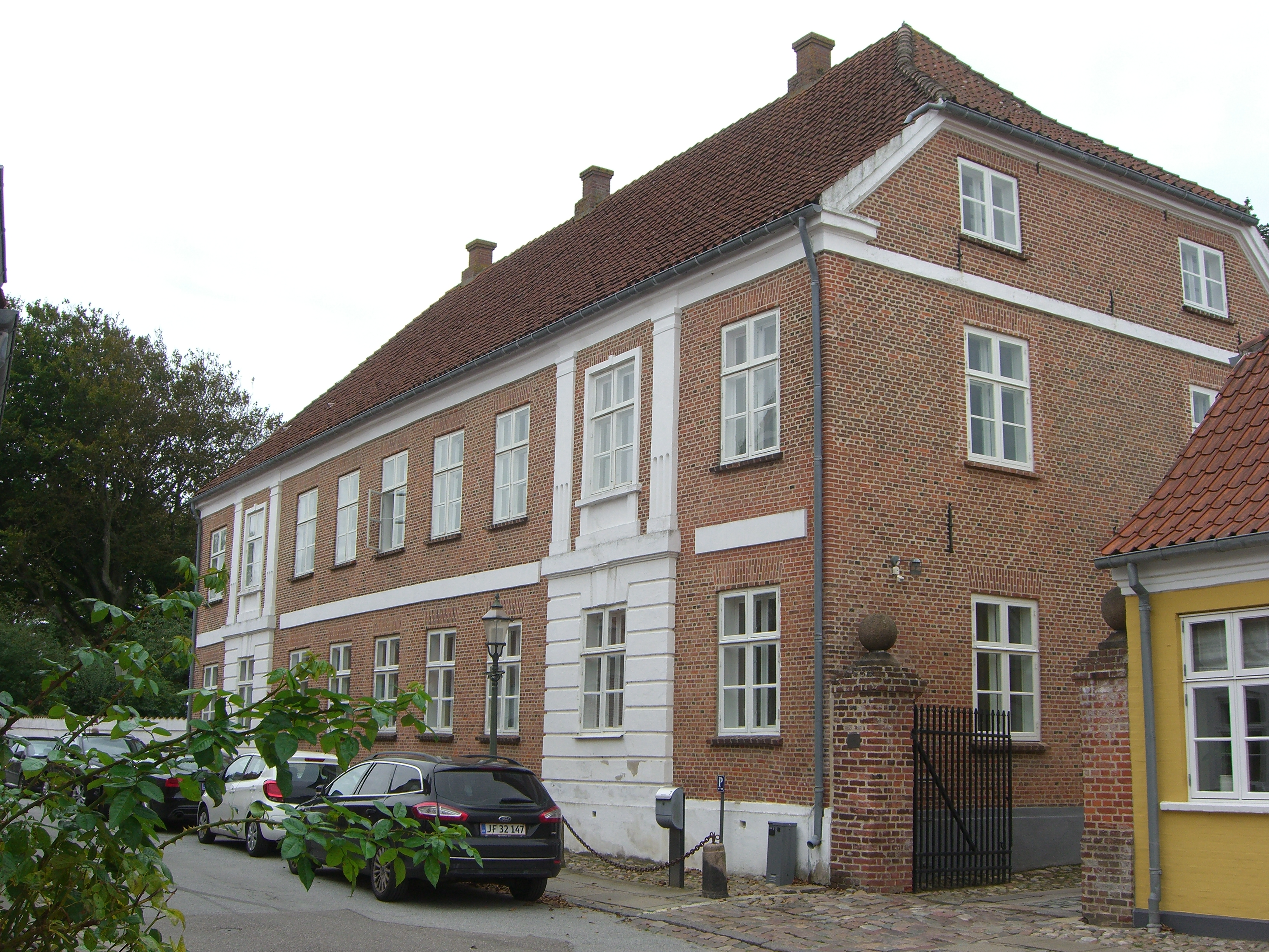 Korsbrødregården, Bispegården i Ribe